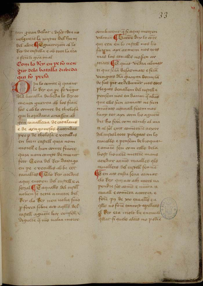 crònica de bernat desclot 1288